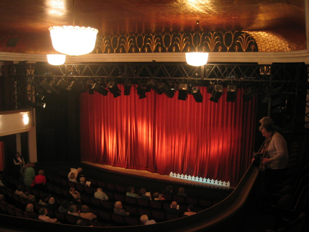 München, Komödie im Bayerischen Hof